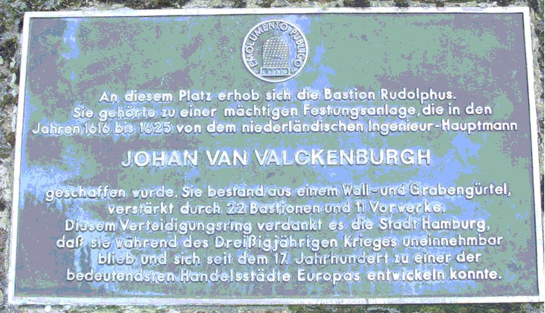 Gedenktafel an Johann van Valckenburg, den Architekten der Wallanlagen in Hamburg. Gestiftet von der Patriotischen Gesellschaft. Standort: In Hamburg, Planten un Blomen, gegenüber den Tropengewächshäusern am Ende der Brücke.